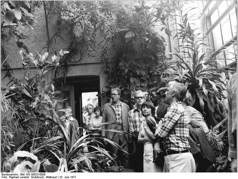 Leipzig, Botanischer Garten ADN-ZB Raphael 23.6.1977 pe. Leipzig: Sein 100jähriges Bestehen feiert der Botanische Garten der Leipziger Karl-Marx-Universität in diesen Tagen. Aus diesem Anlaß fand eine internationale Fachtagung statt, an der Botaniker aus elf Ländern teilnahmen, u.a. aus der VR Polen, aus Kuba und der BRD (Foto). Die Wissenschaftler des Leipziger Botanischen Gartens unterhalten zur Zeit Kontakte zu über 800 botanischen Einrichtungen in 77 Ländern. Der Garten existierte bereits vor 1877, jedoch an einem anderen Standort.